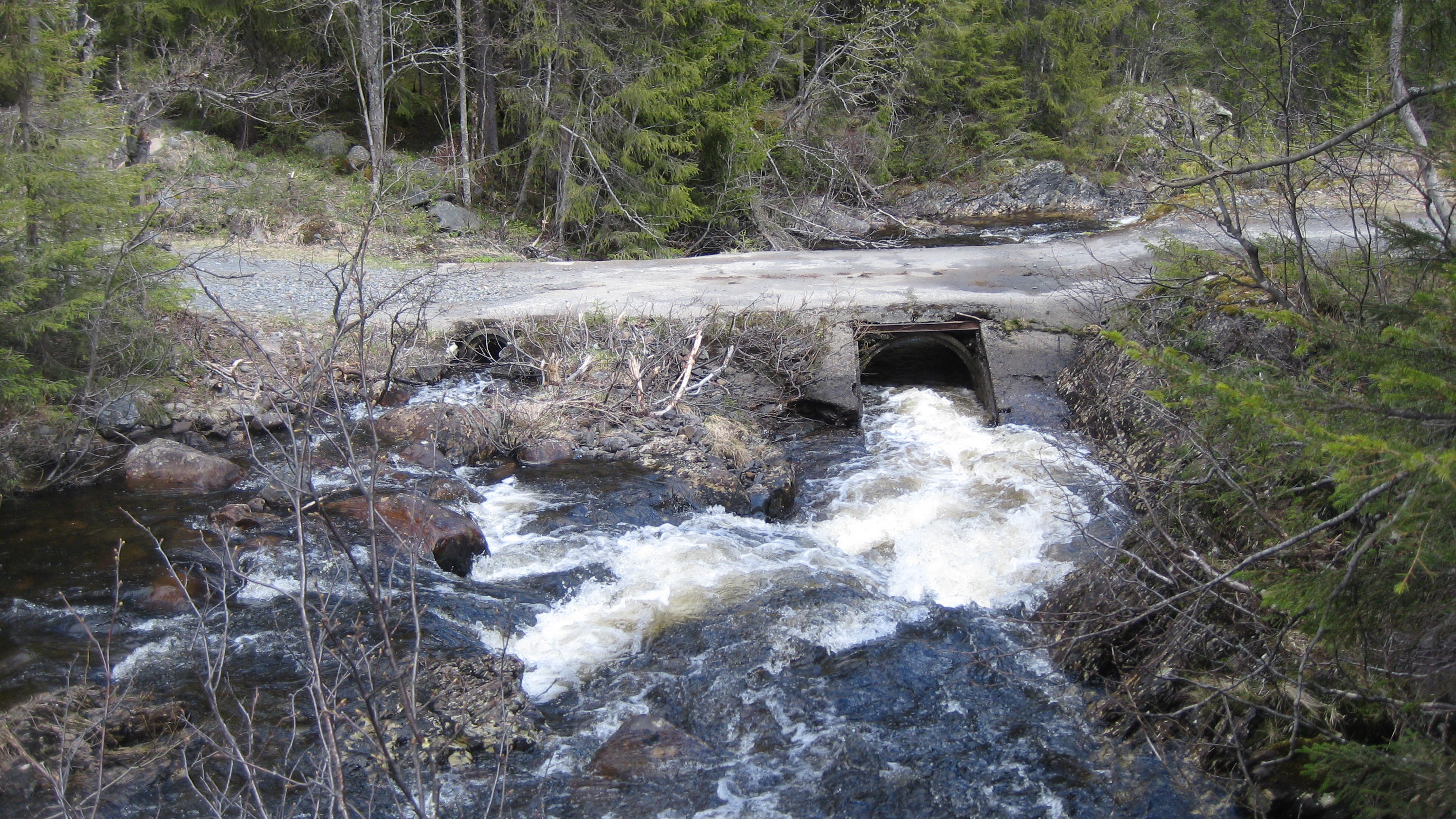 Laenvegen krysser Kjøljua